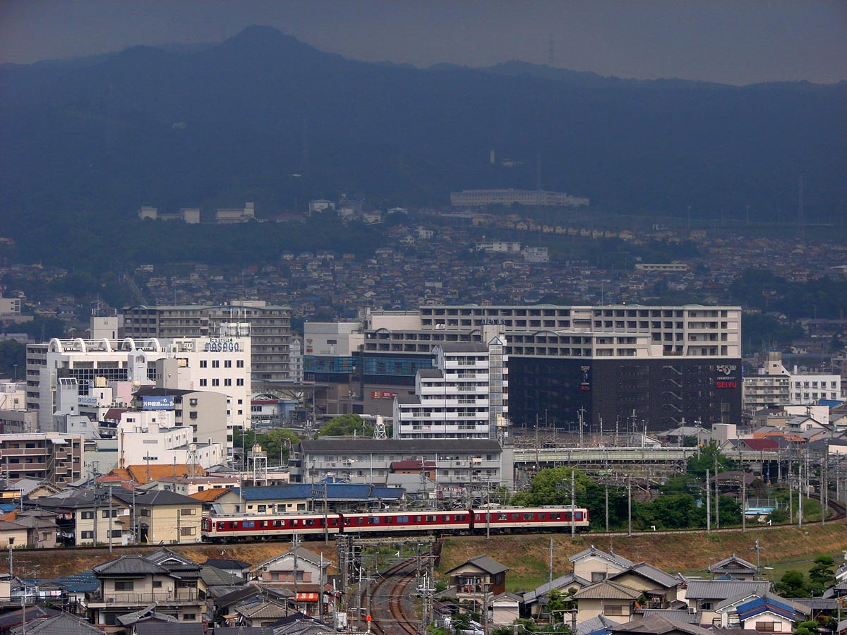 近鉄 8400系